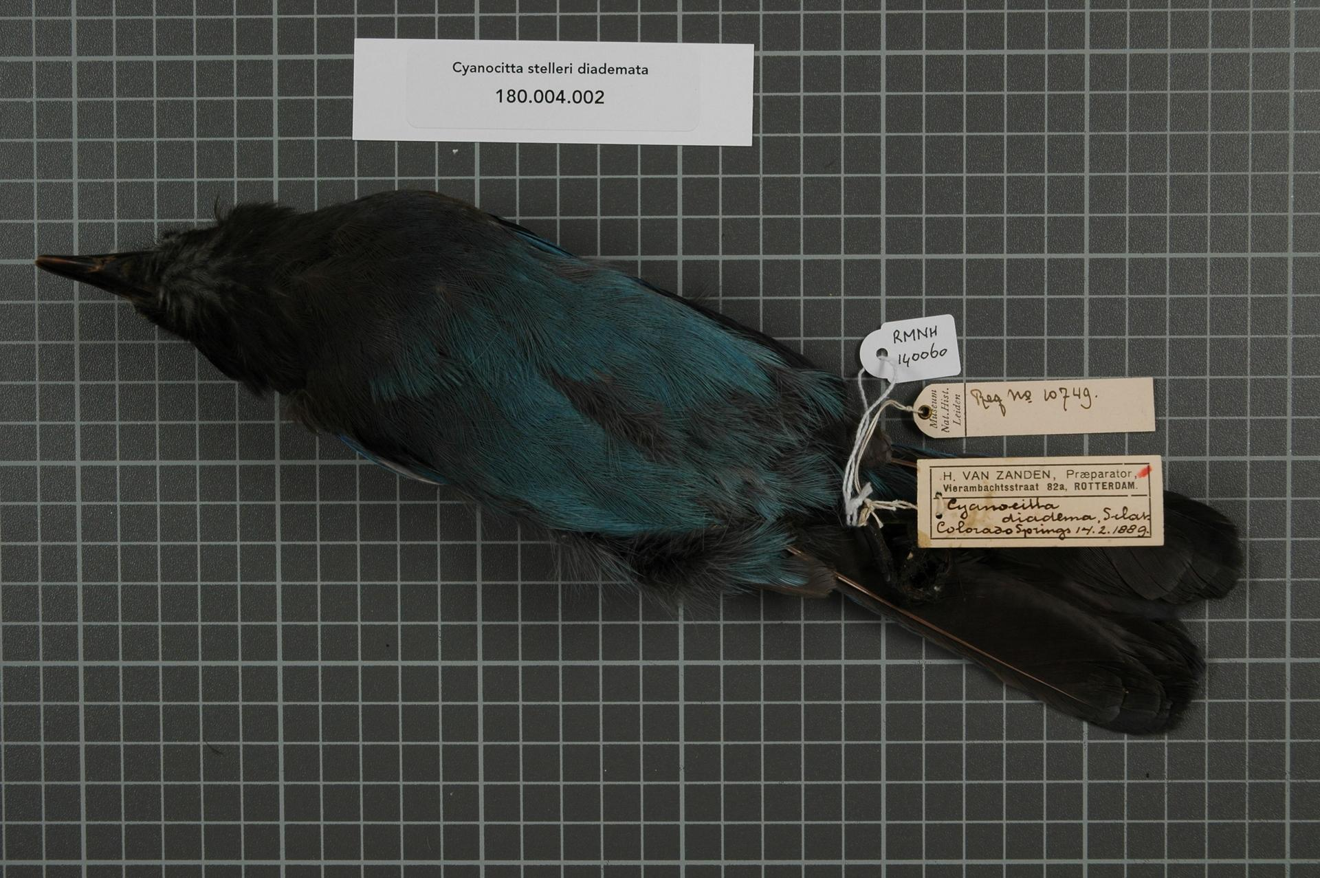 Cyanocitta stelleri diademata (Bonaparte, 1851)